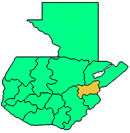 Mappa della diocesi cattolica di Zacapa, in Guatemala. Lavoro personale eseguito a partire da questa immagine di Commons. Fonte per i confini delle diocesi